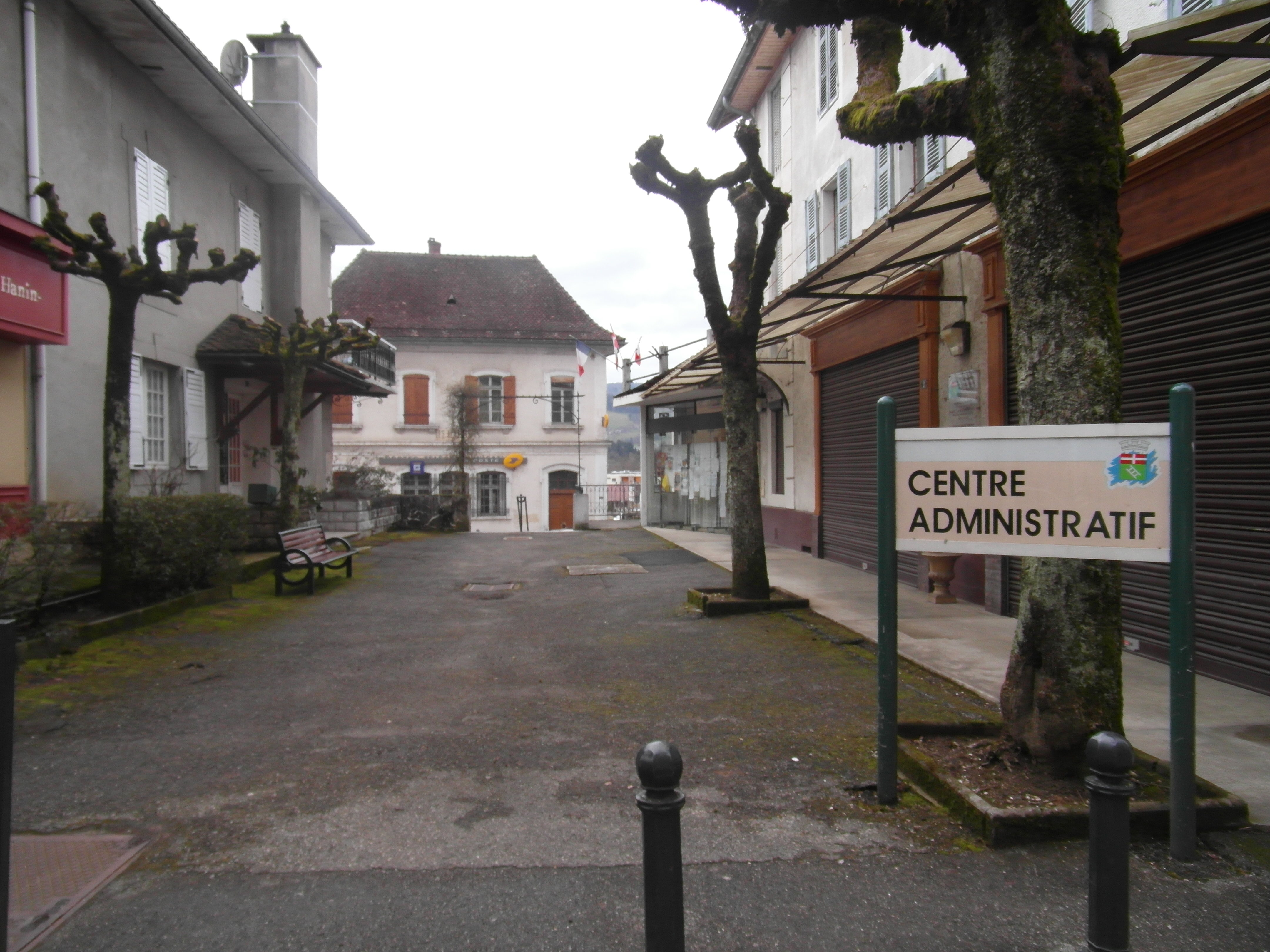 centre ville des Echelles